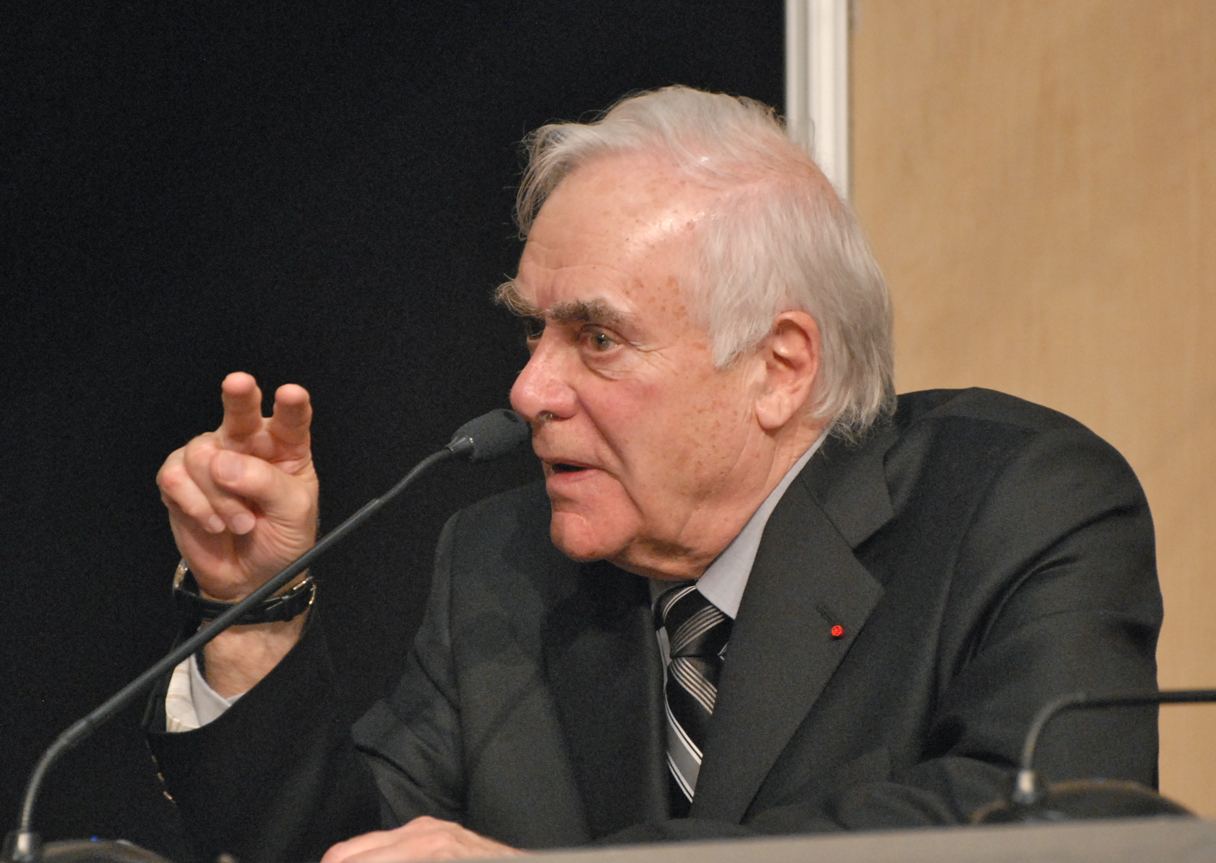 Marcel Masse, lors du Salon international du livre de Québec 2012